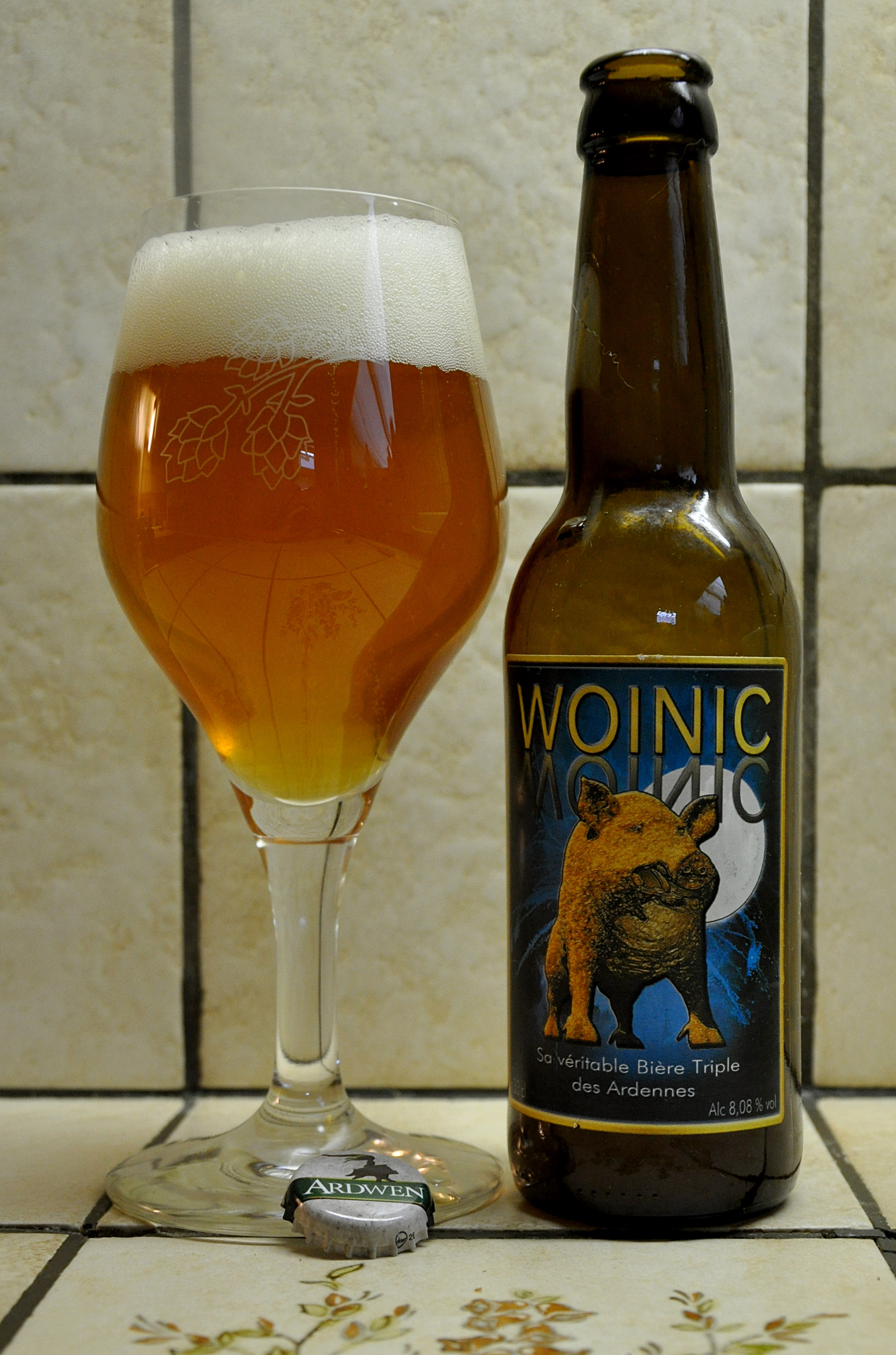 Woinic